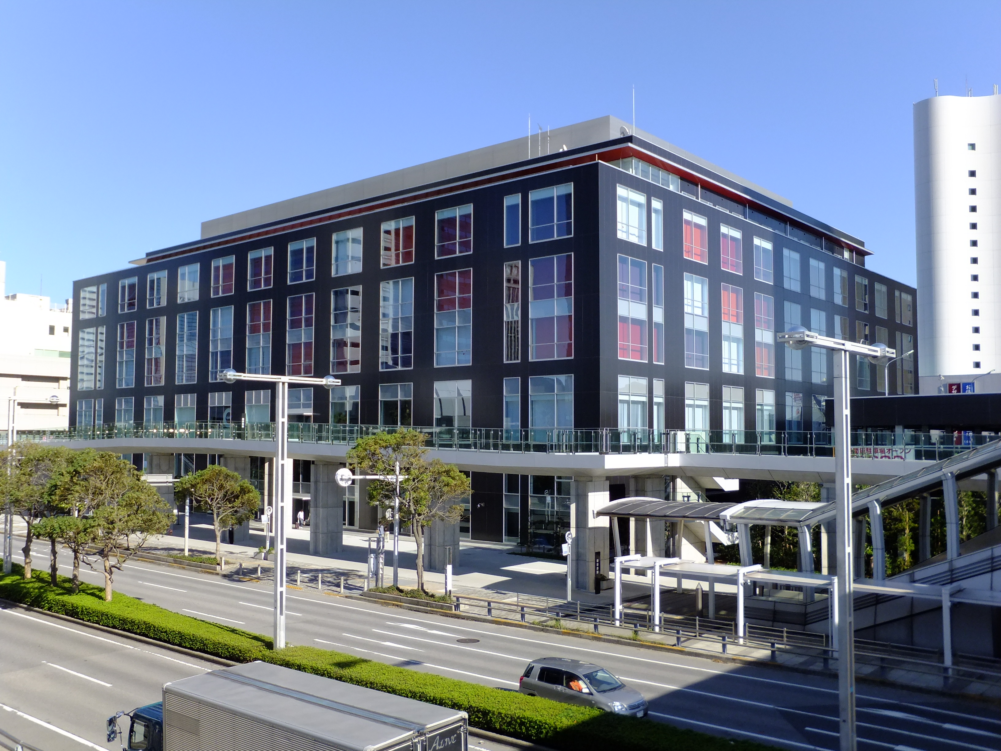 QVCジャパン本社ビル、QVCスクエア